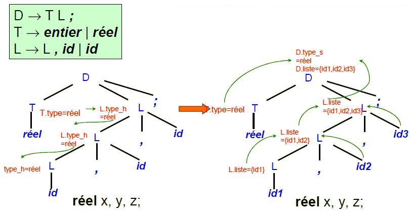 Transformation Grammaire L vers S attribuee